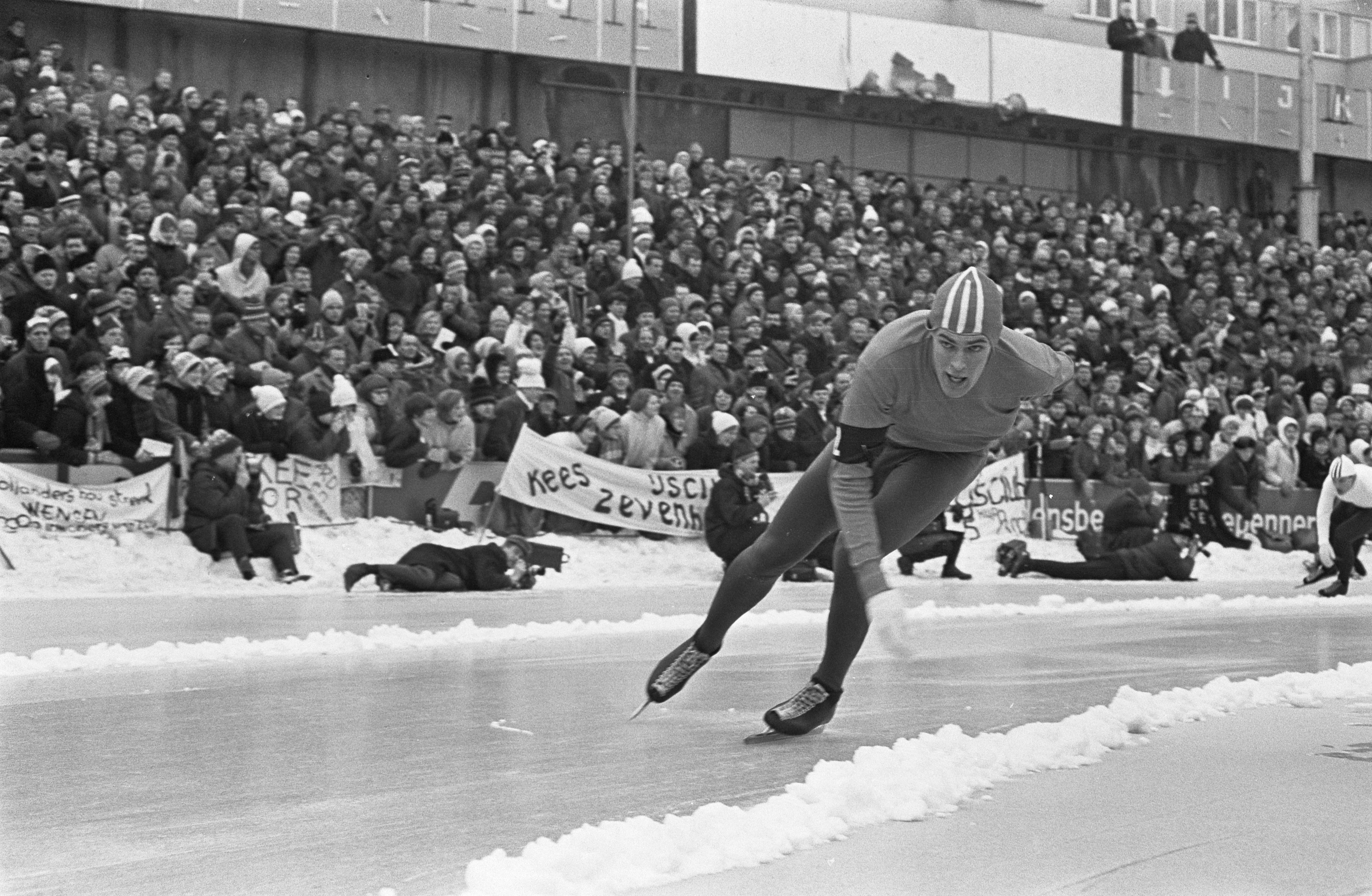 Collectie / Archief : Fotocollectie Anefo Reportage / Serie : [ onbekend ] Beschrijving : Wereldkampioenschappen schaatsen in Oslo, Schenk in aktie op de binnenbaan Datum : 12 februari 1967 Locatie : Noorwegen, Oslo Trefwoorden : schaatsen, sport Persoonsnaam : Schenk, Ard Fotograaf : Kroon, Ron / Anefo Auteursrechthebbende : Nationaal Archief Materiaalsoort : Negatief (zwart/wit) Nummer archiefinventaris : bekijk toegang 2.24.01.05 Bestanddeelnummer : 920-0677